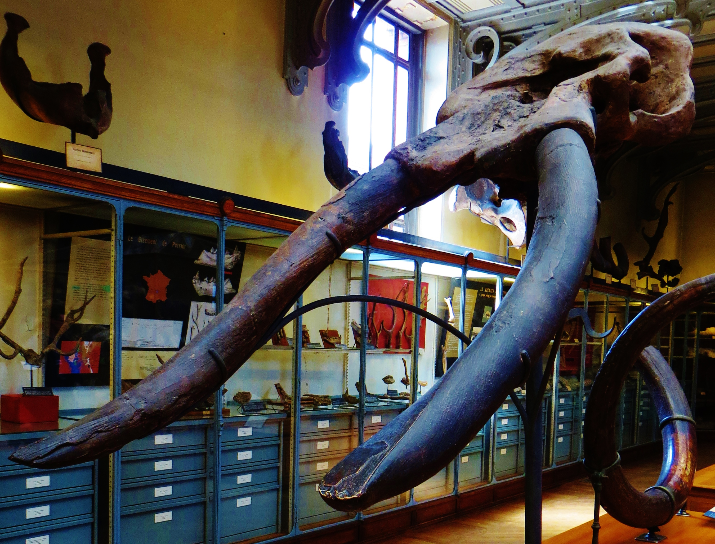 Fossil of Cuvieronius, an extinct mammal- Took the photo at Musee d'Histoire Naturelle, Paris